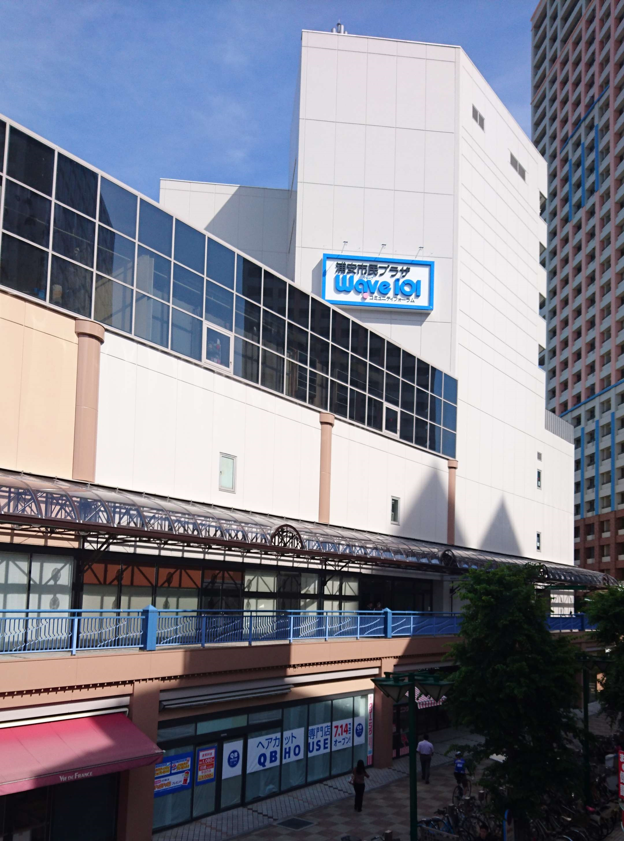 イオン新浦安店 西棟外観